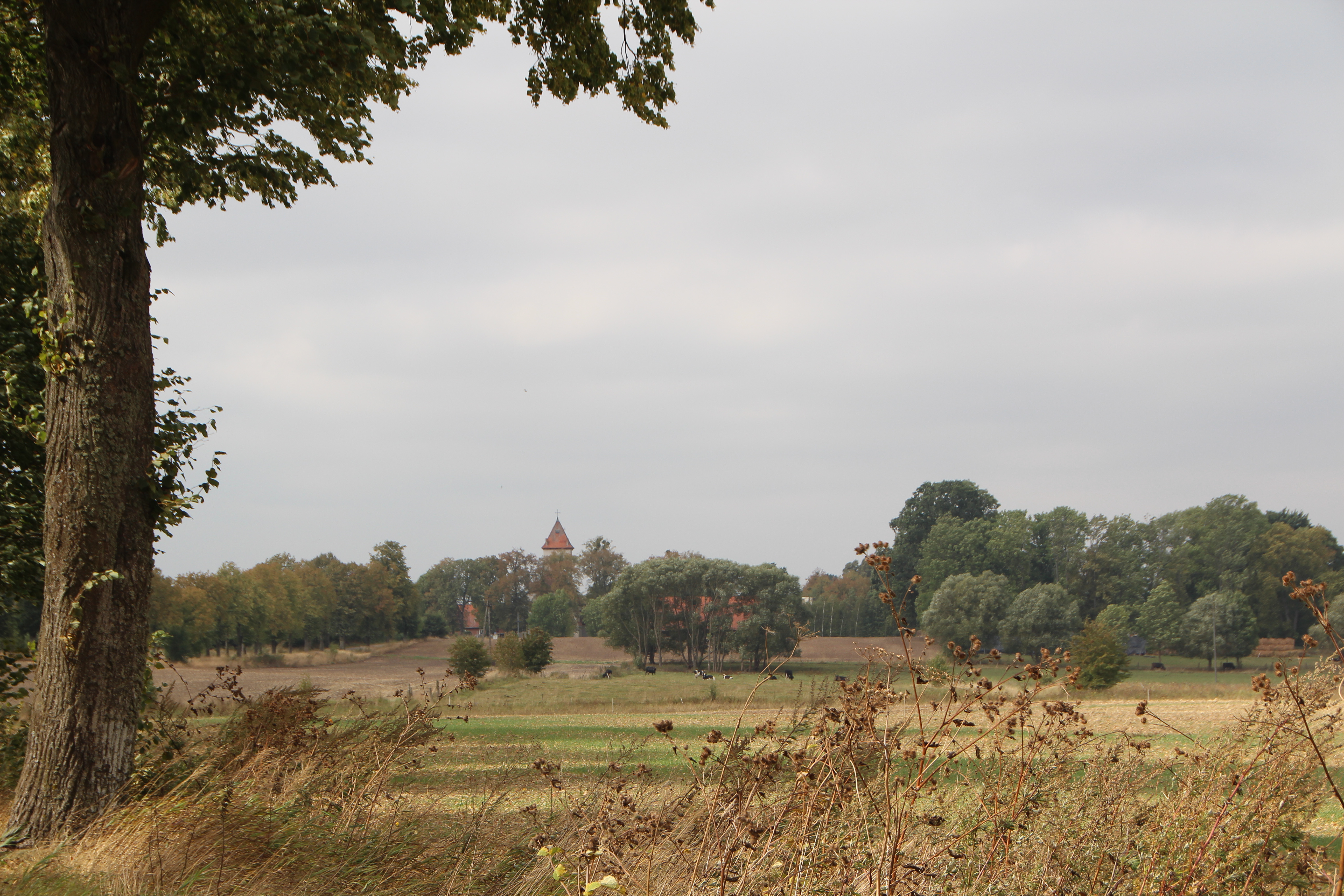 Momajny - wieś w Polsce położona w województwie warmińsko-mazurskim, w powiecie kętrzyńskim, w gminie Barciany.